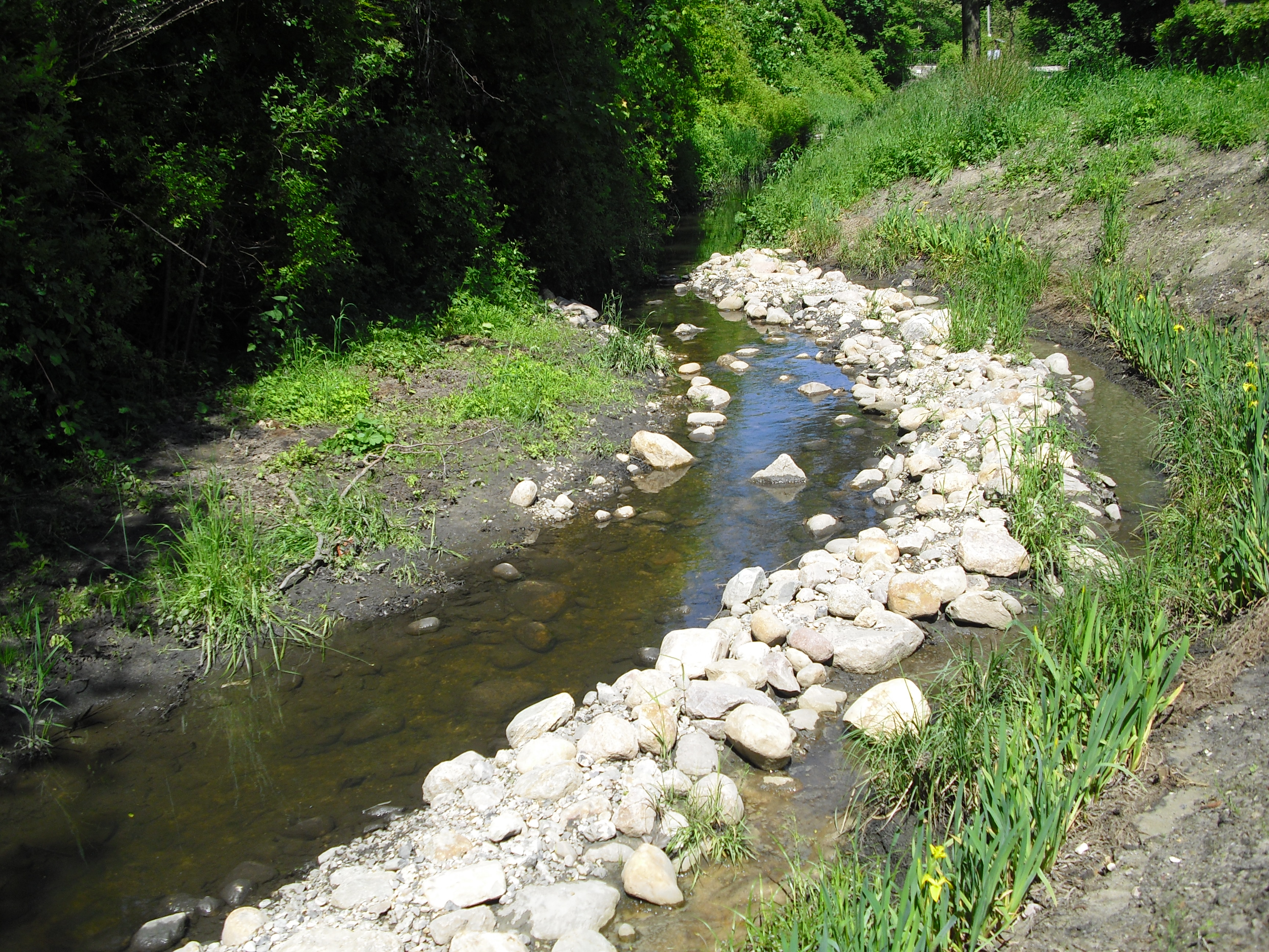 Seebek